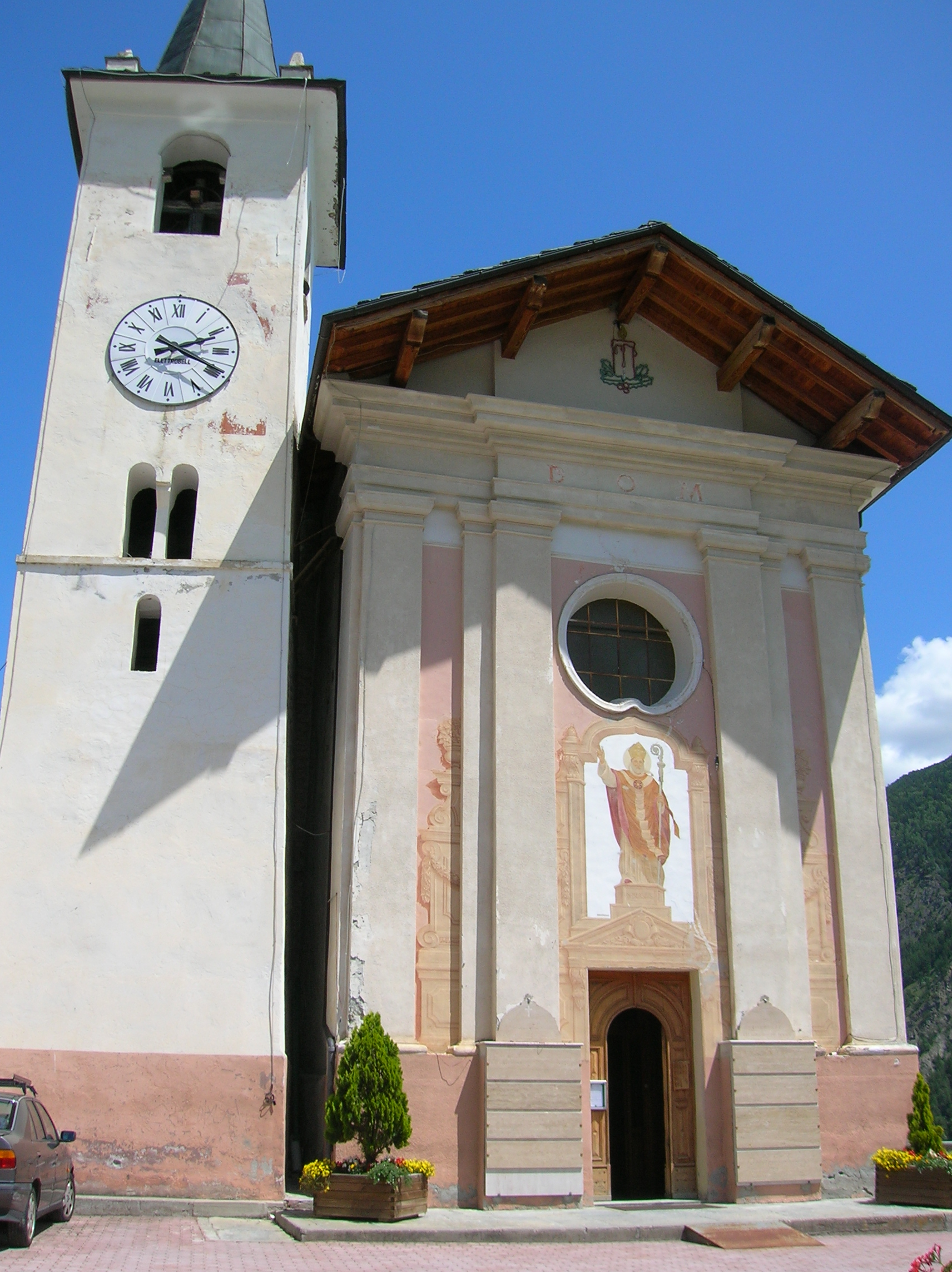 Facciata della Chiesa parrocchiale, Doues, Valle d'Aosta, Italia.